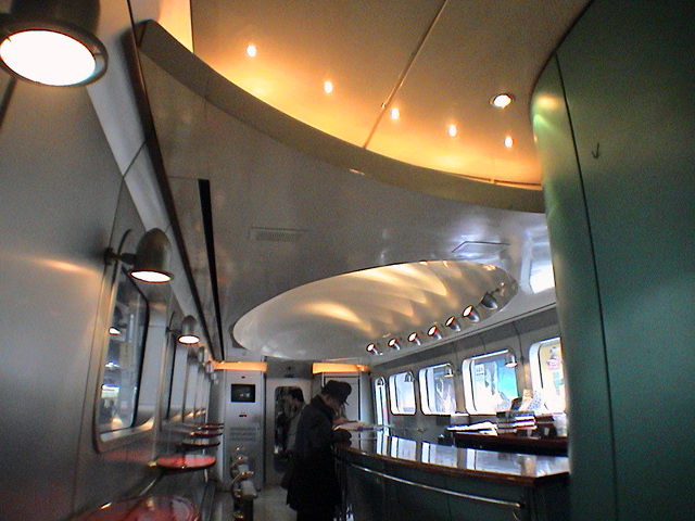 JR九州787系電車ビュッフェ